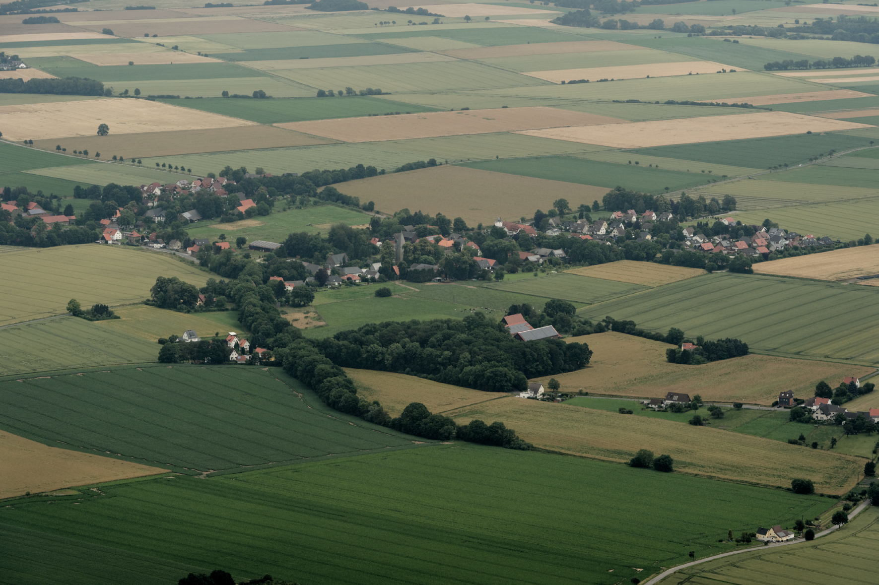 Fotoflug Sauerland-Nord. Bad Sassendorf-Neuengeseke, Landesstraße 668, Blickrichtung Nordost. The making of this document was supported by the Community-Budget of Wikimedia Germany.